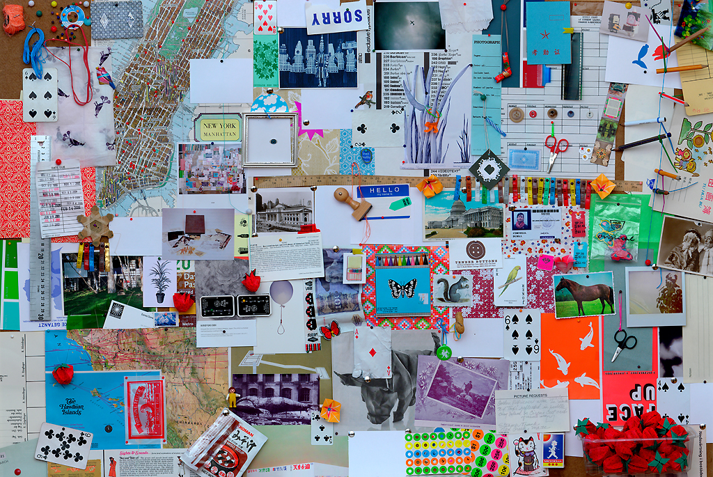 pinboard